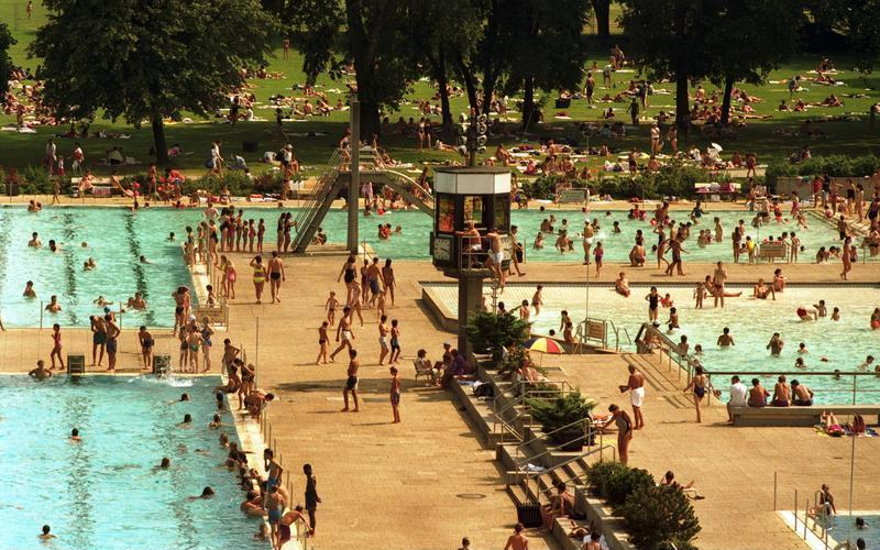 30.7.1991 Freibäder in Bonn Römerbad an der Nordbrücke